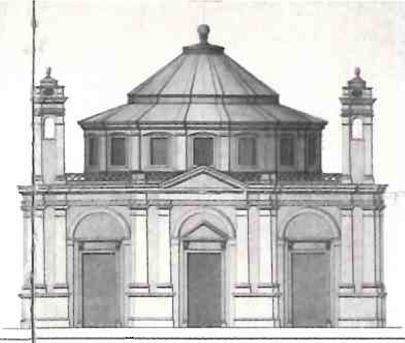 Prospetto frontale del progetto di recupero della chiesa di Santa Gerusalemme di Pescara - Archivio di Stato della provincia di Chieti